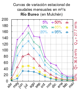 Curvas de variación estacional del río Bureo en Mulchén. # Dirección General de Aguas # Diagnóstico y clasificación de los cursos y cuerpos de agua según objetivos de calidad. Cuenca del río Biobío. # Santiago de Chile # Ministerio de Obras Públicas (Chile) # 2004 # url: # urlarchivo: # Tabla 4.14: Estación Bureo en Mulchén pág.85 mes 5% 10% 20% 50% 85% 95% abr 36.56 27.22 19.05 9.63 4.15 2.53 may 134.29 109.22 83.15 45.31 17.47 8.67 jun 154.09 134.56 113.44 79.76 47.95 33.20 jul 181.07 156.23 129.67 87.99 49.60 32.19 ago 145.32 126.69 106.22 73.25 43.09 30.17 sep 142.69 111.41 83.46 50.23 30.02 23.77 oct 79.50 65.85 52.42 33.90 19.81 14.45 nov 58.27 46.76 35.82 21.51 11.48 7.94 dic 51.62 36.25 24.04 11.92 6.30 4.96 ene 25.26 18.91 13.48 7.46 4.16 3.24 feb 15.57 11.93 8.85 5.50 3.71 3.23 mar 16.26 13.09 10.07 6.09 3.28 2.28 This plot was created with Gnuplot.